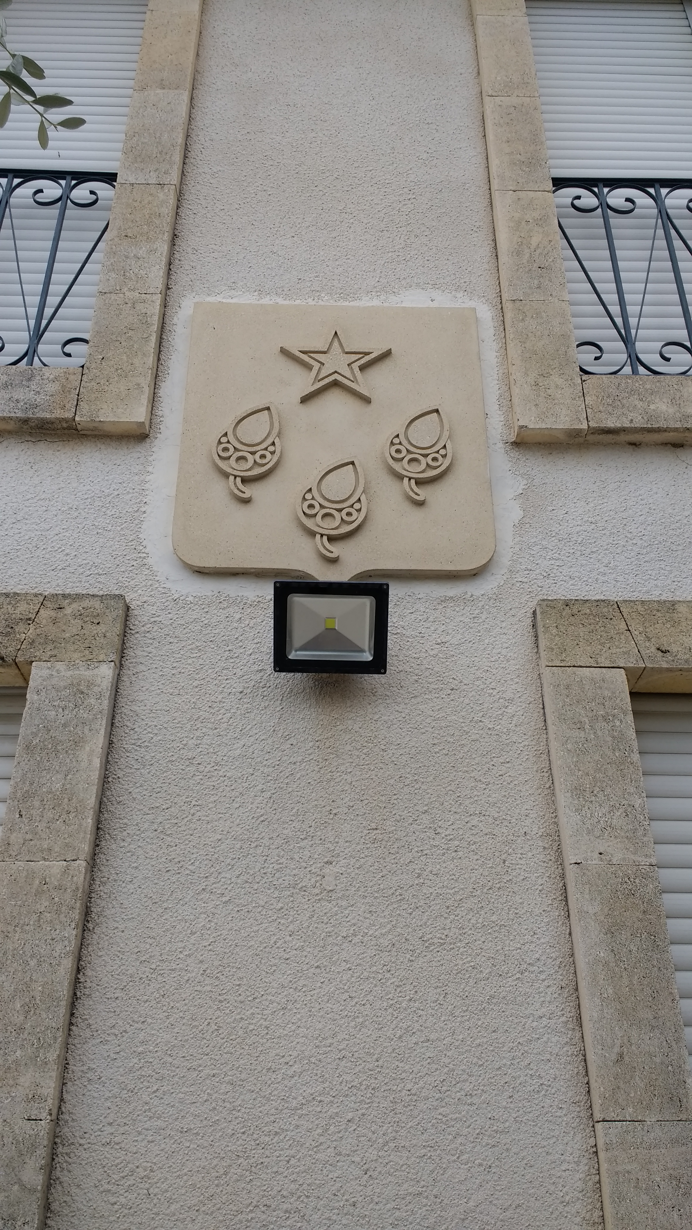 Documents liés à l'OPL Jacou de 2017